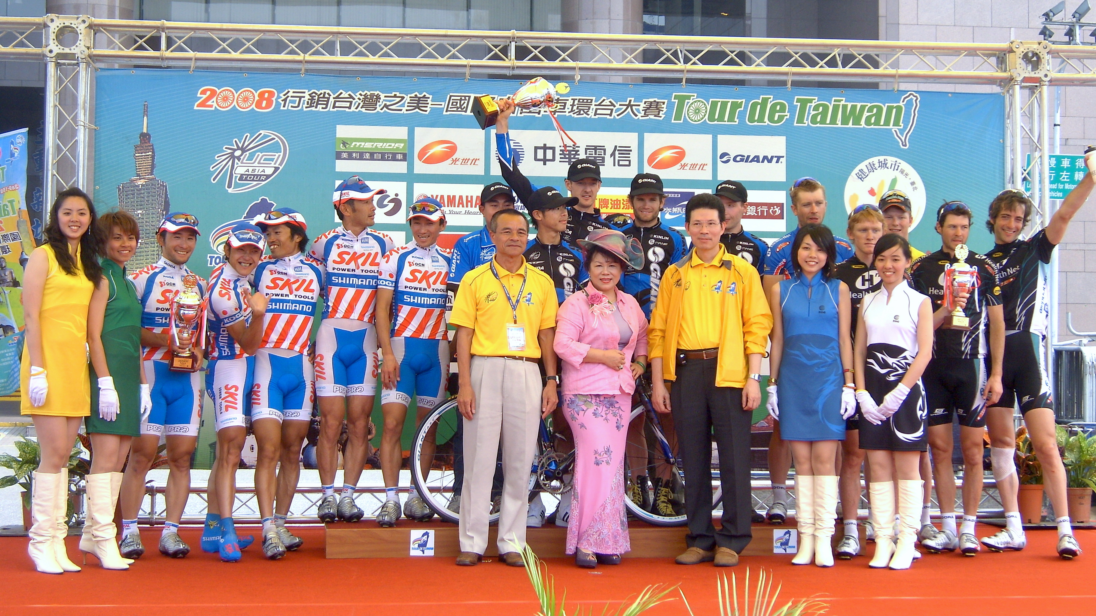 2008 Tour de Taiwan Stage 8: Stage and Overall Winners.